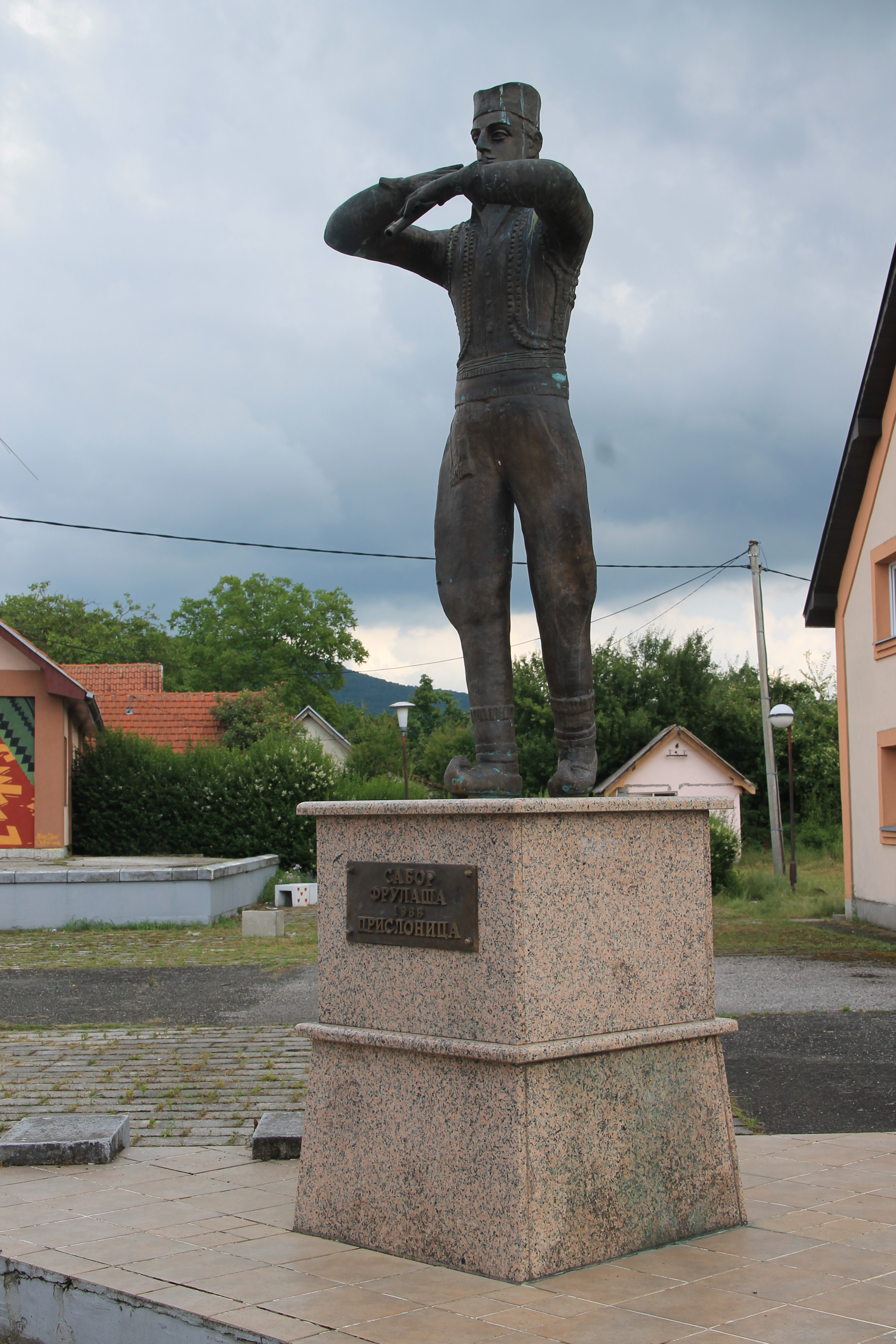 Prislonica